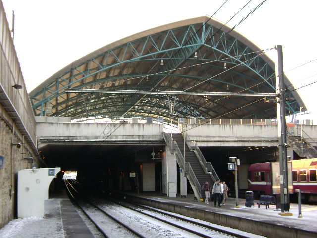 Station Halle, gezien van op perron